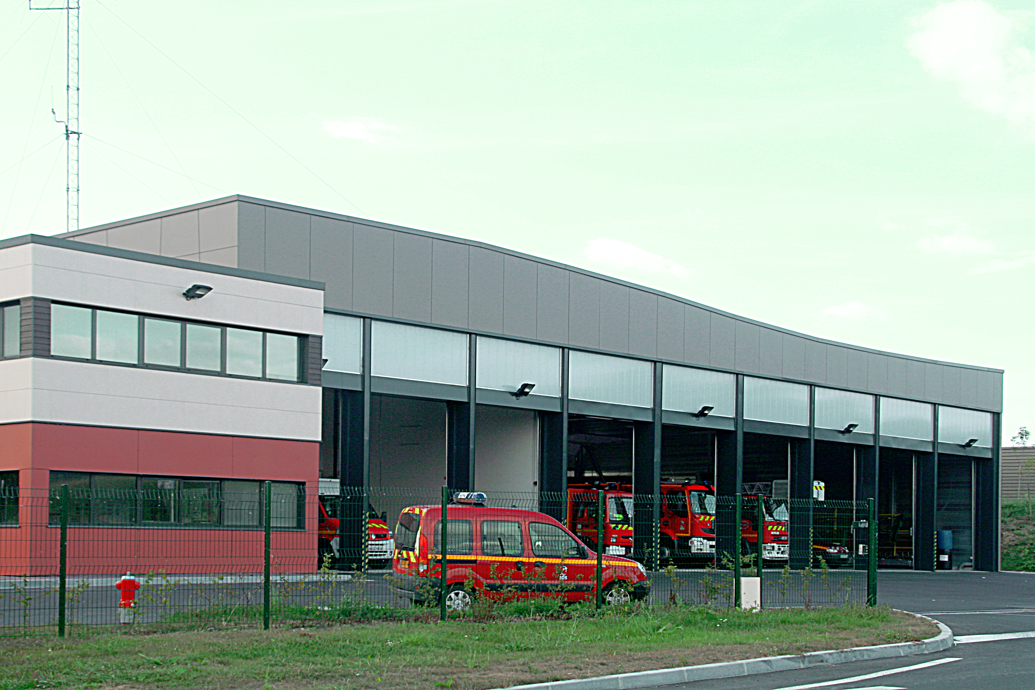 nouveau centre des pompiers de Périers-en-Auge